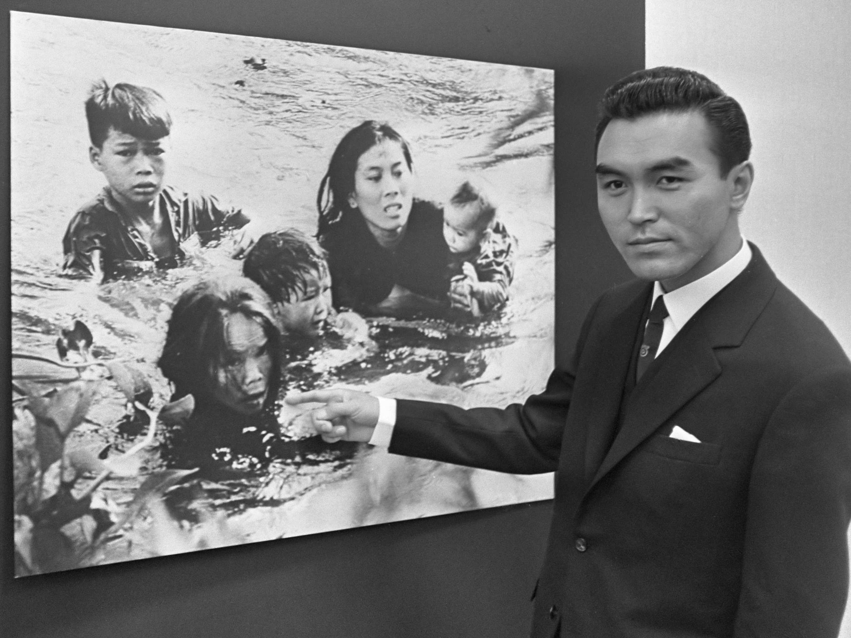 Prijsuitreiking World Press Photo 1965; winnaar Kyoichi Sawada bij zijn foto "Flee to Safety " 10 december 1965